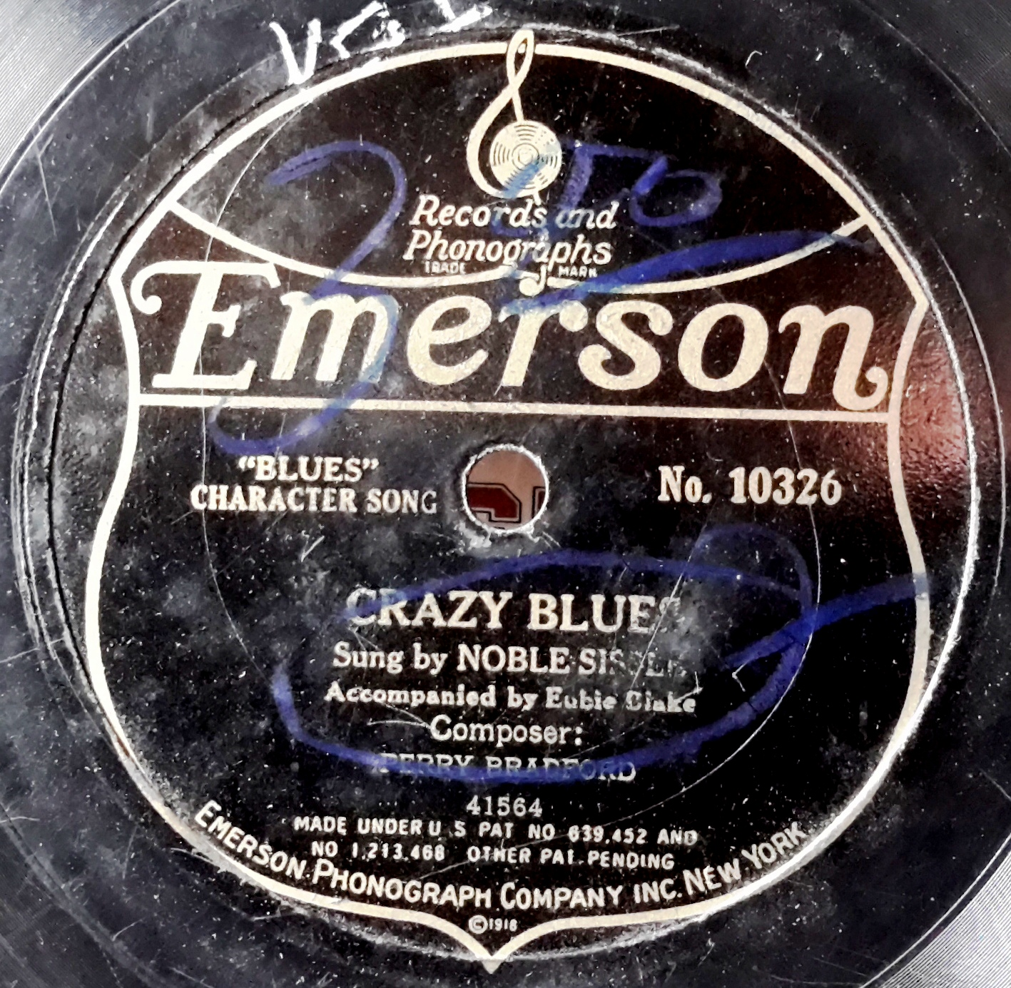 Label der US-Marke Emerson aus der ersten Hälfte der 1920er Jahre, frühe Jazzaufnahme von Noble Sissle, Gesang, und Eubie Blake, Piano